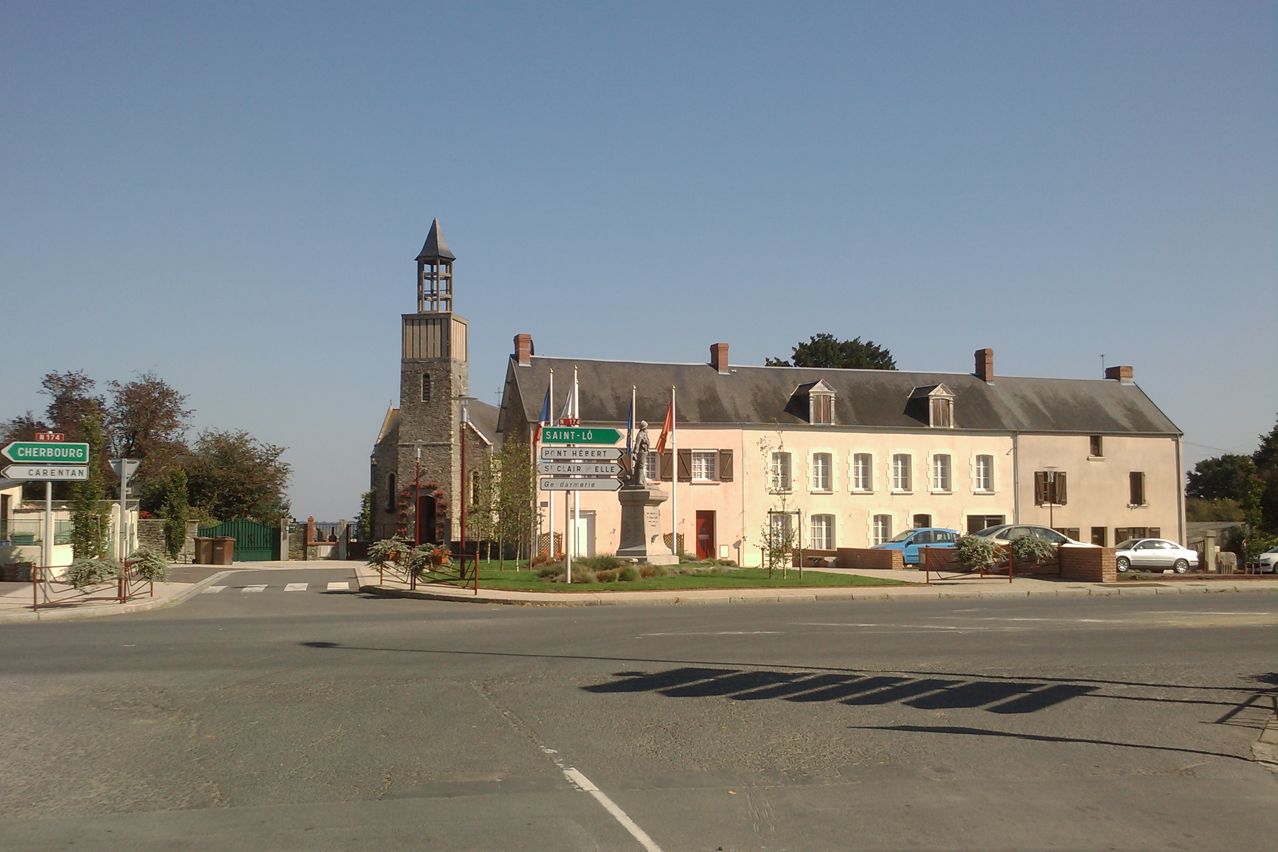 Saint-Jean-de-Daye